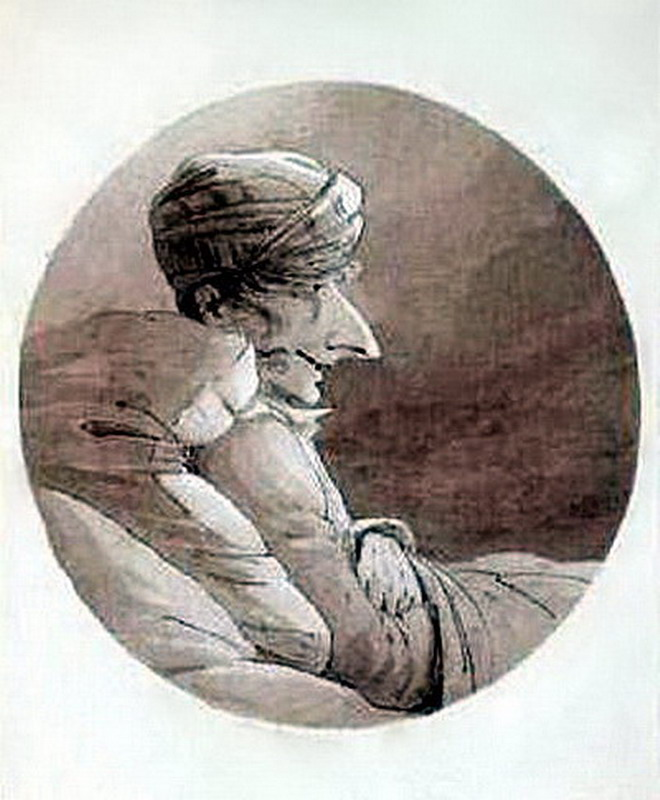 image numérisée d'un tableau ancien à partir du catalogue d'un site internet.